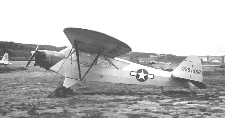 PiperL-4Hcrissy